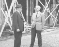 Arkitekt Lennart Tham (till höger))